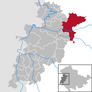 Hörselberg-Hainich in Thuringia - Wartburgkreis